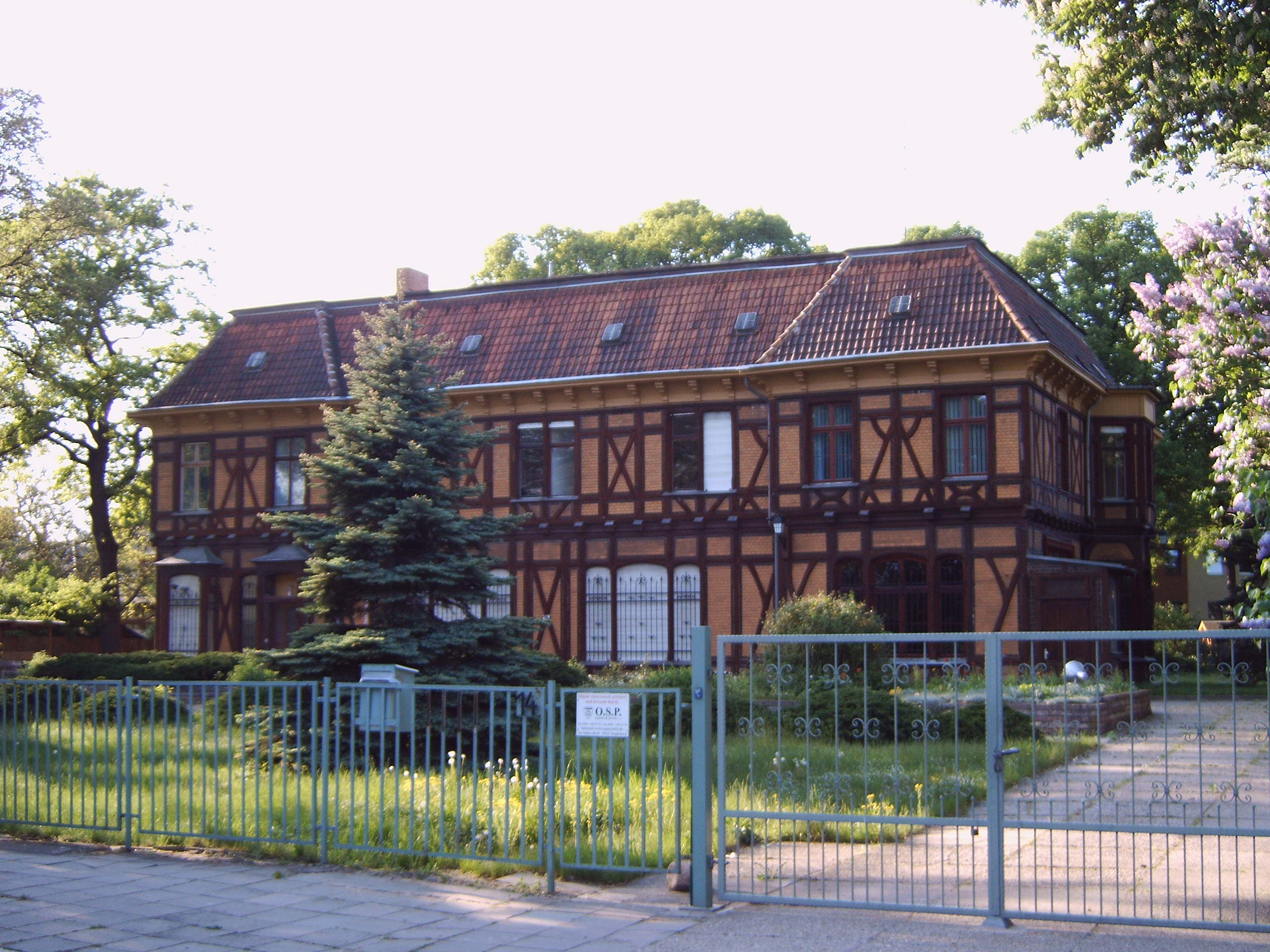 Ehemalige Villa des Industriellen Richard Toepffer in Magdeburg, Stadtteil Stadtfeld Ost